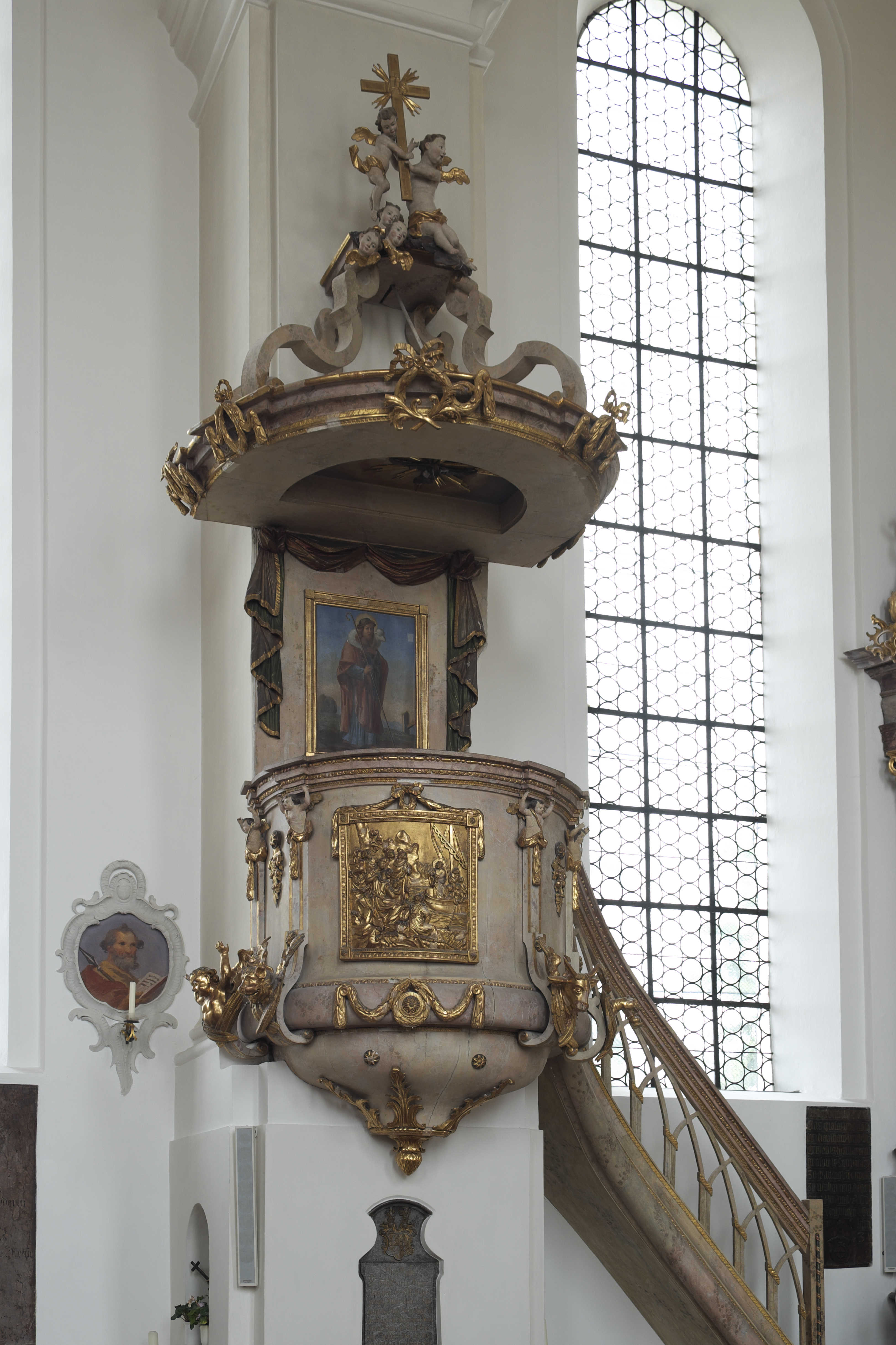 Katholische Pfarrkirche St. Ägidius in Grafing bei München im Landkreis Ebersberg (Bayern/Deutschland), Kanzel aus dem 18. Jahrhundert